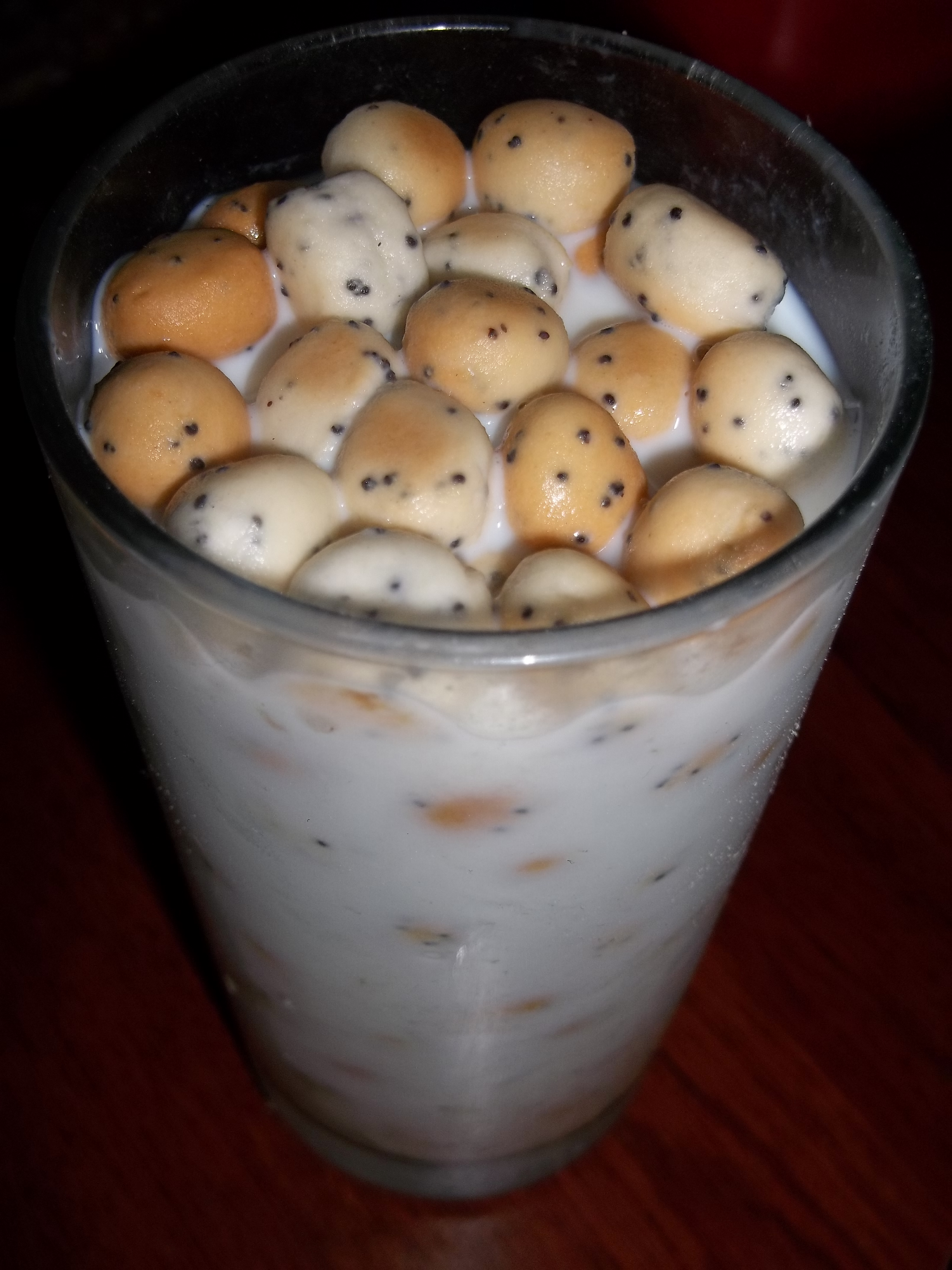 Aguonpienis ir kūčiukai